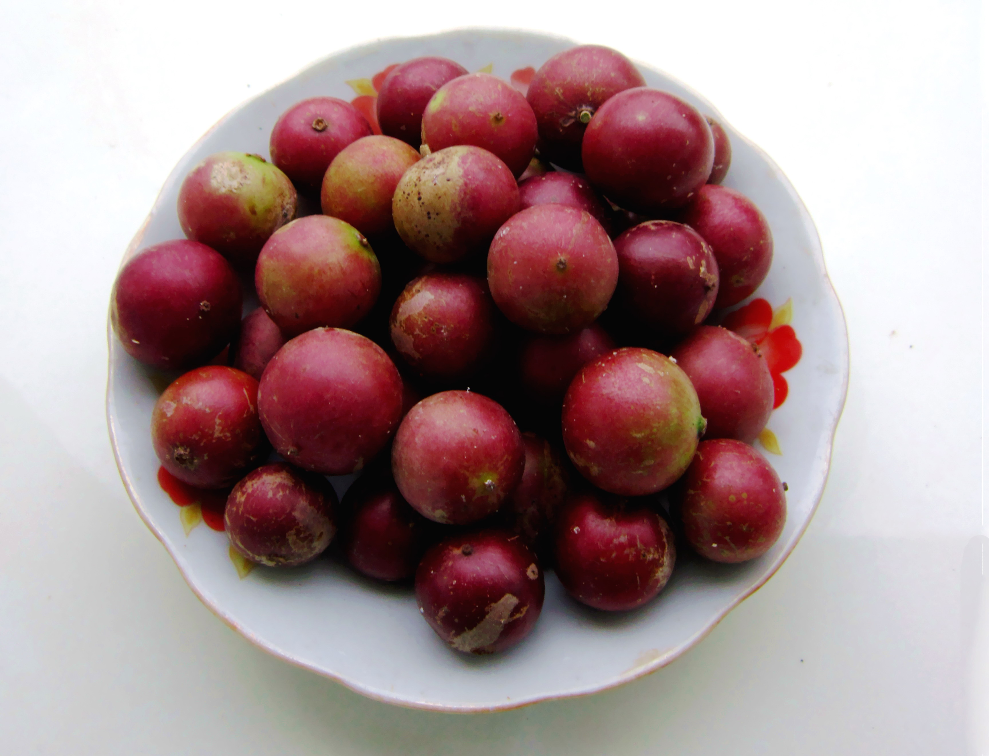 Trái hồng quân (Flacourtia jangomas) đã chín, ăn được.